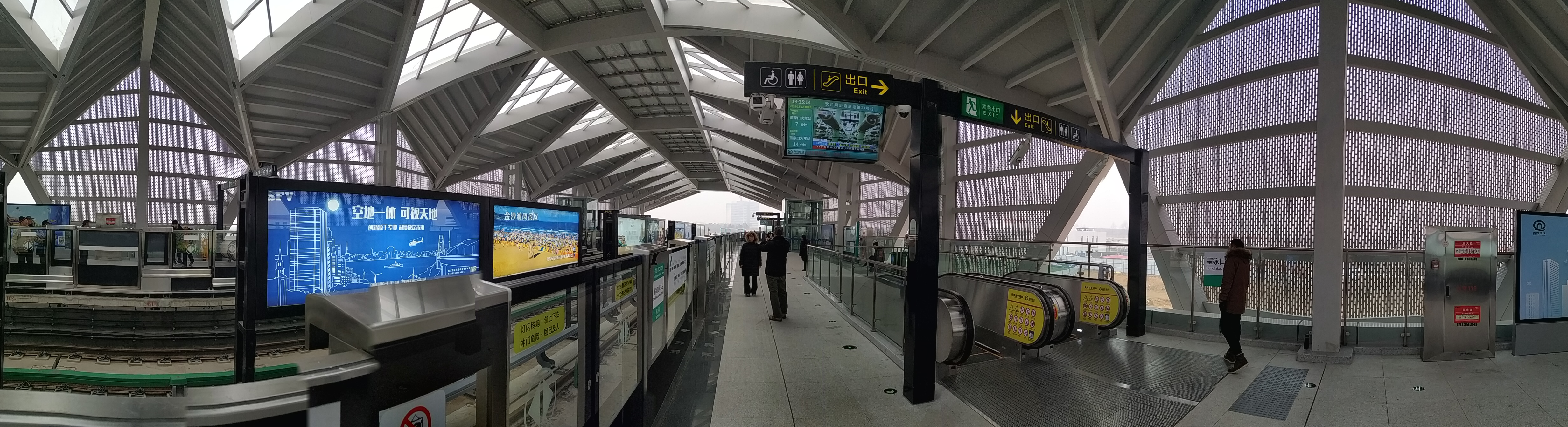 董家口站站台